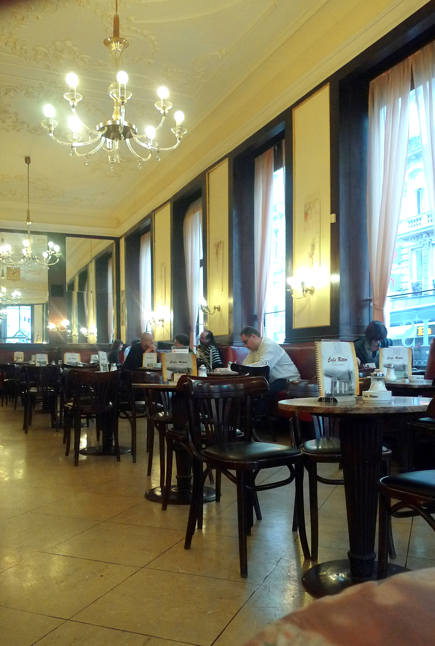 Café Ritter, im Januar 2011